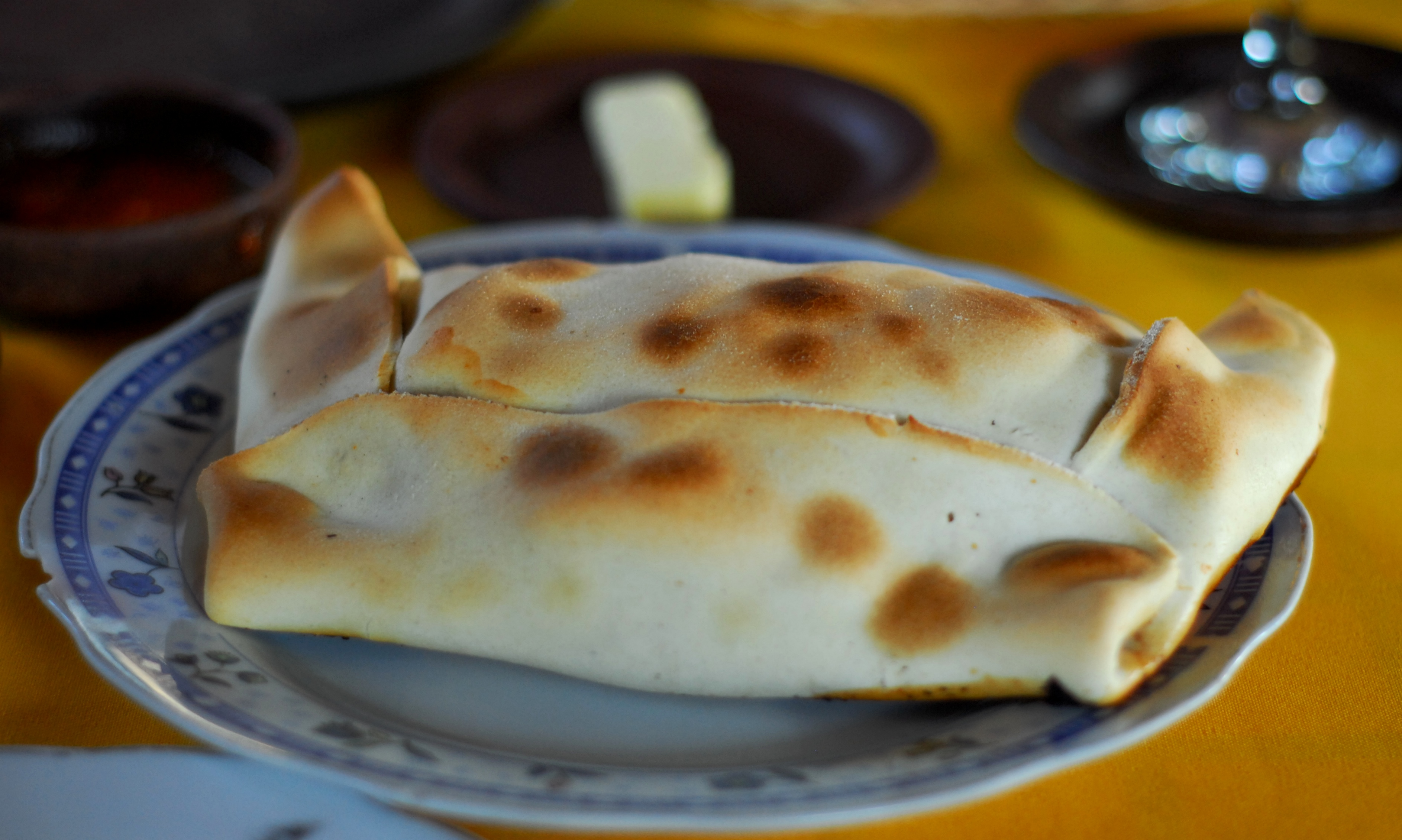 Los Naranjos restaurant in Pomaire, Chile.